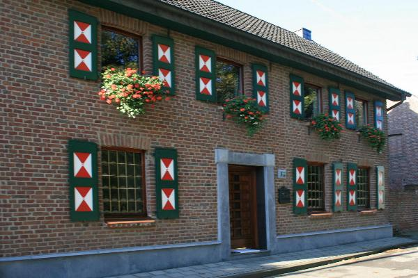 Wohnhaus in Wegberg-Mehlbusch